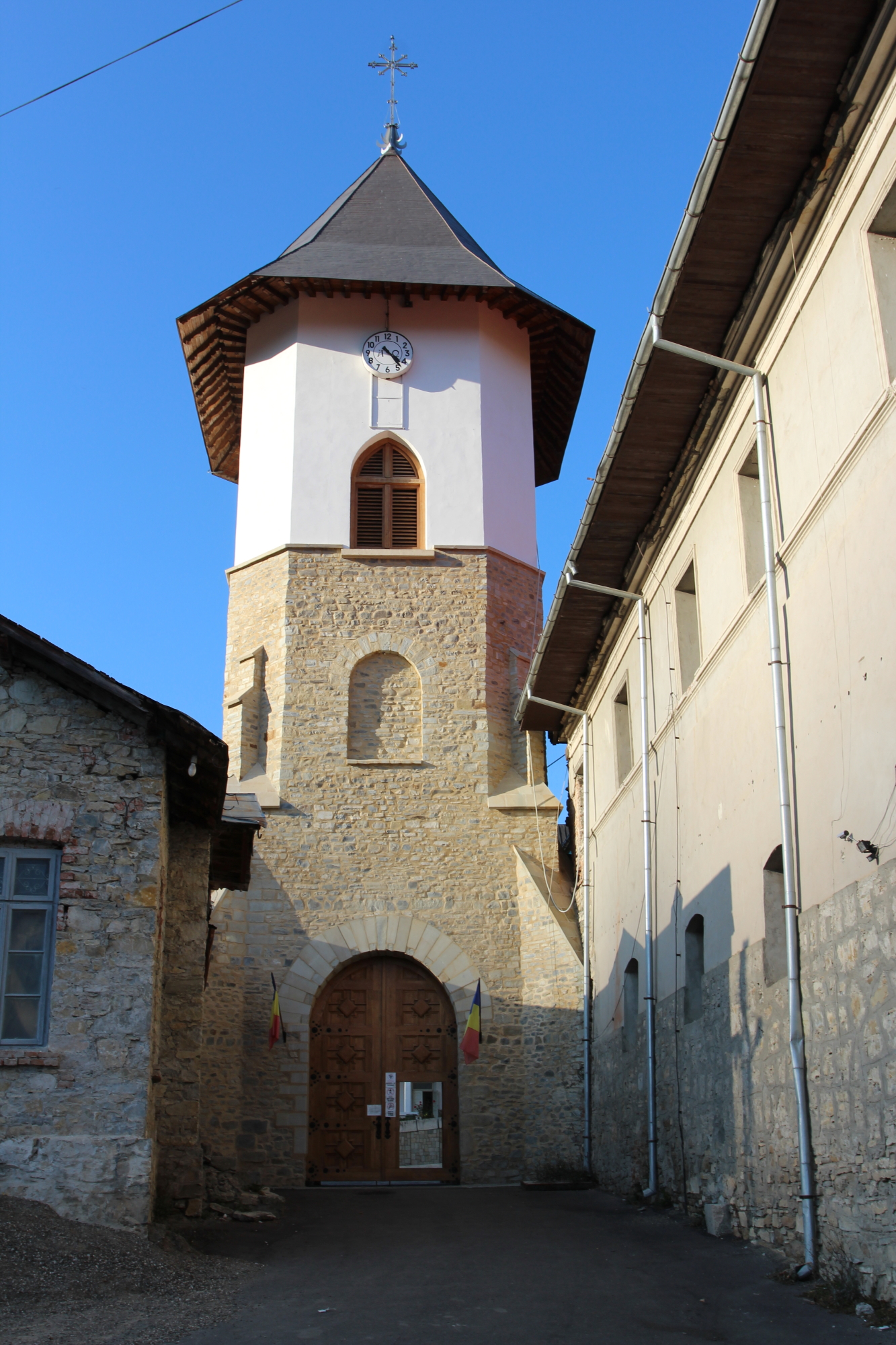 Fundații turn clopotniță 04